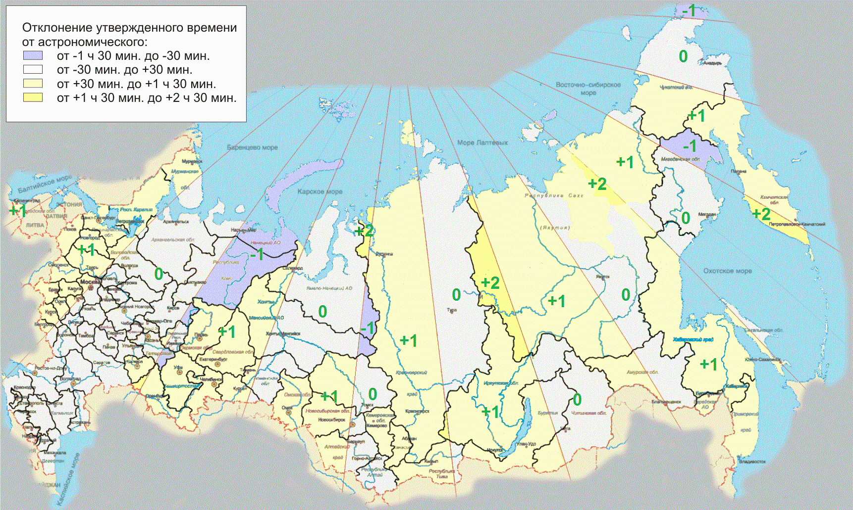 Разница между стандартным поясным временем и установленным в результате государственных реформ в России в 2010-2011 гг.